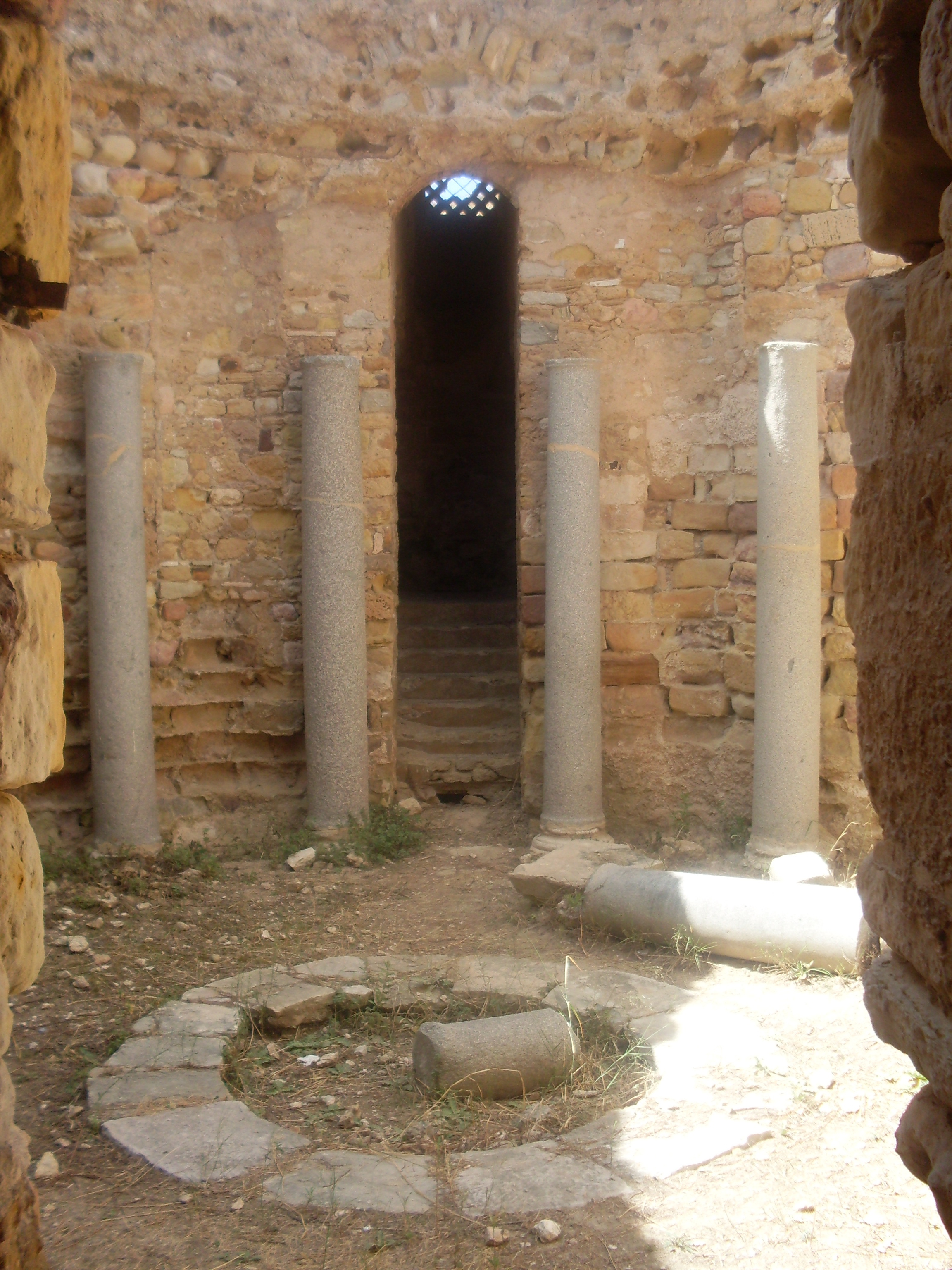 Tunisie, Carthage, la rotonde de damous el Karita